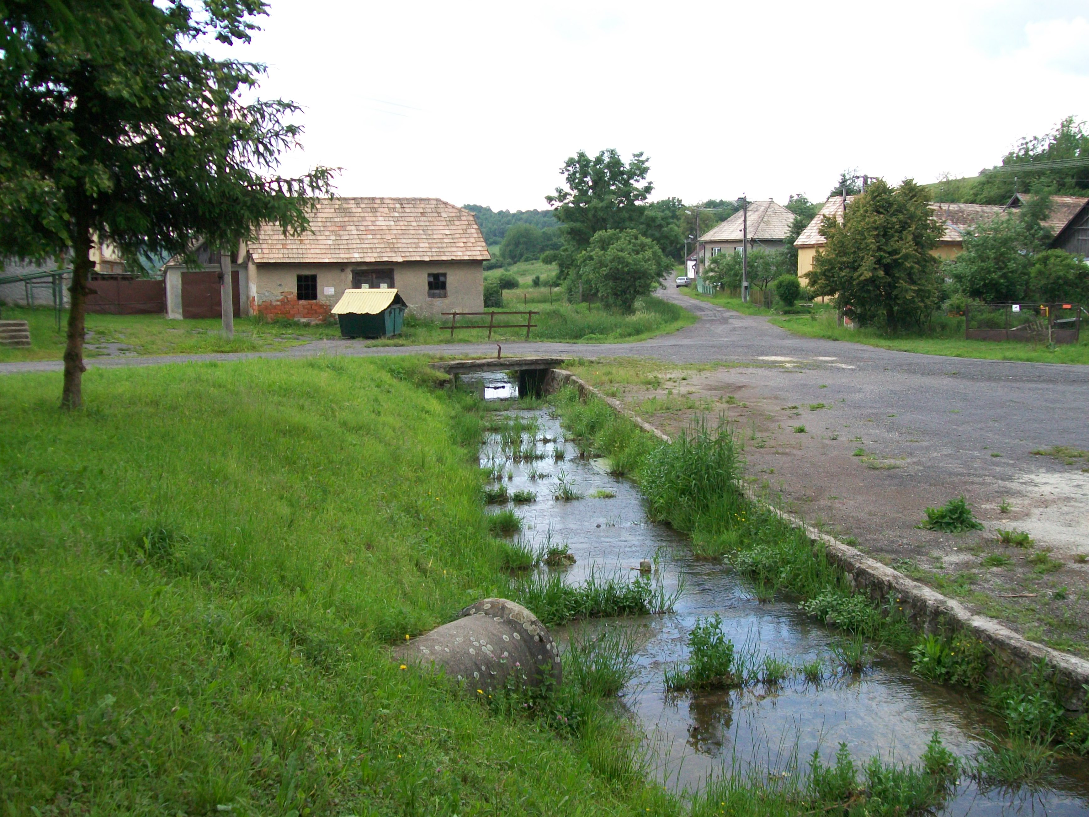 Polichniansky potok pretekajúci obcou Polichno